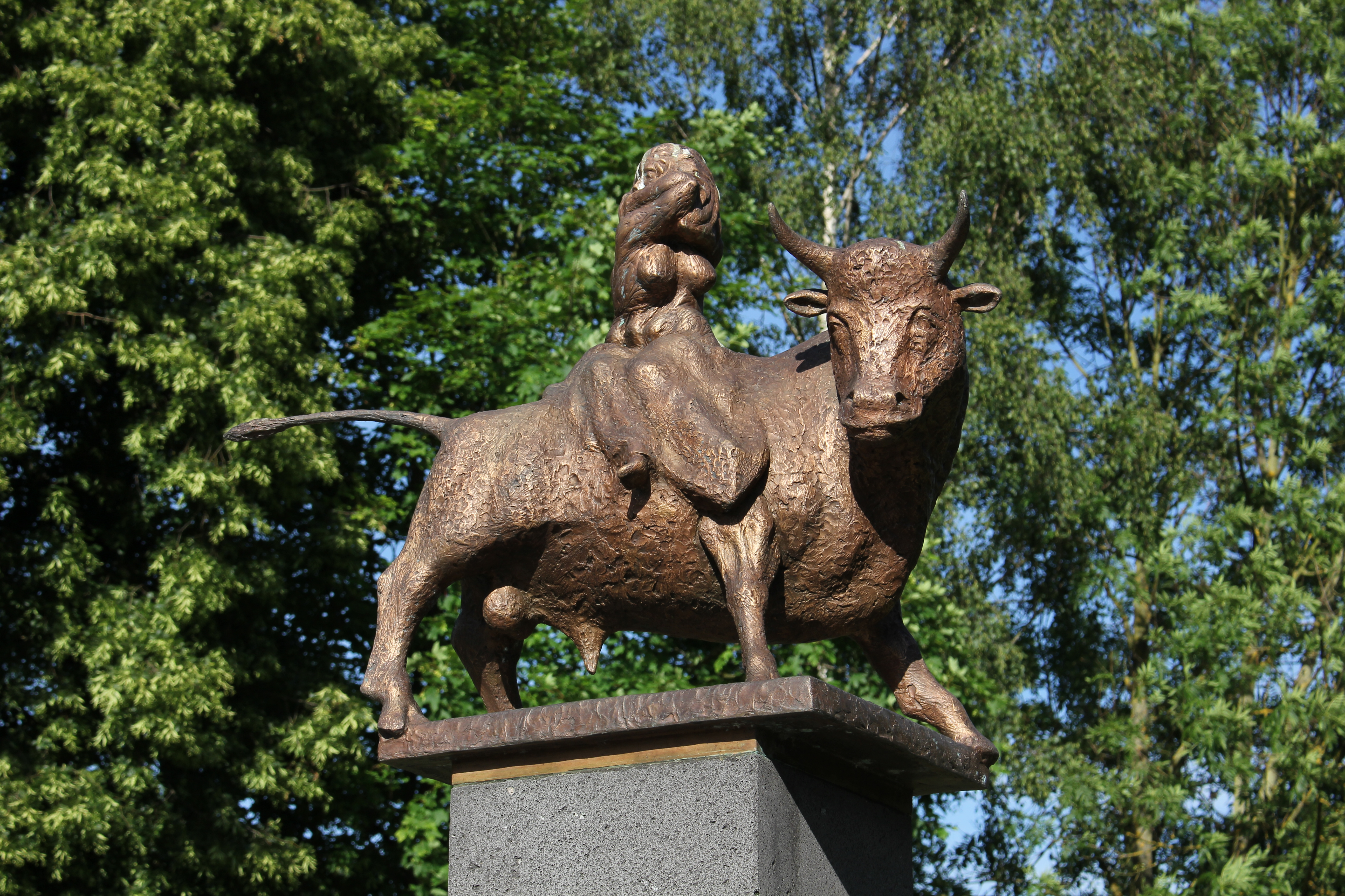 Zeus in Gestalt eines Stiers entführt die Königstochter „Europa“, Detail des Adenauer-Schuman-Gedenkzeichens von Harald Stieding (* 1940) in Bassenheim, eingeweiht am 17. Juni 2012. Das Denkmal erinnert an das Treffen von Konrad Adenauer und Robert Schuman am 8. Oktober 1948 in der Burg von Bassenheim. Diese Begegnung gilt als Anfang und Grundlage der späteren deutsch-französischen Freundschaft.